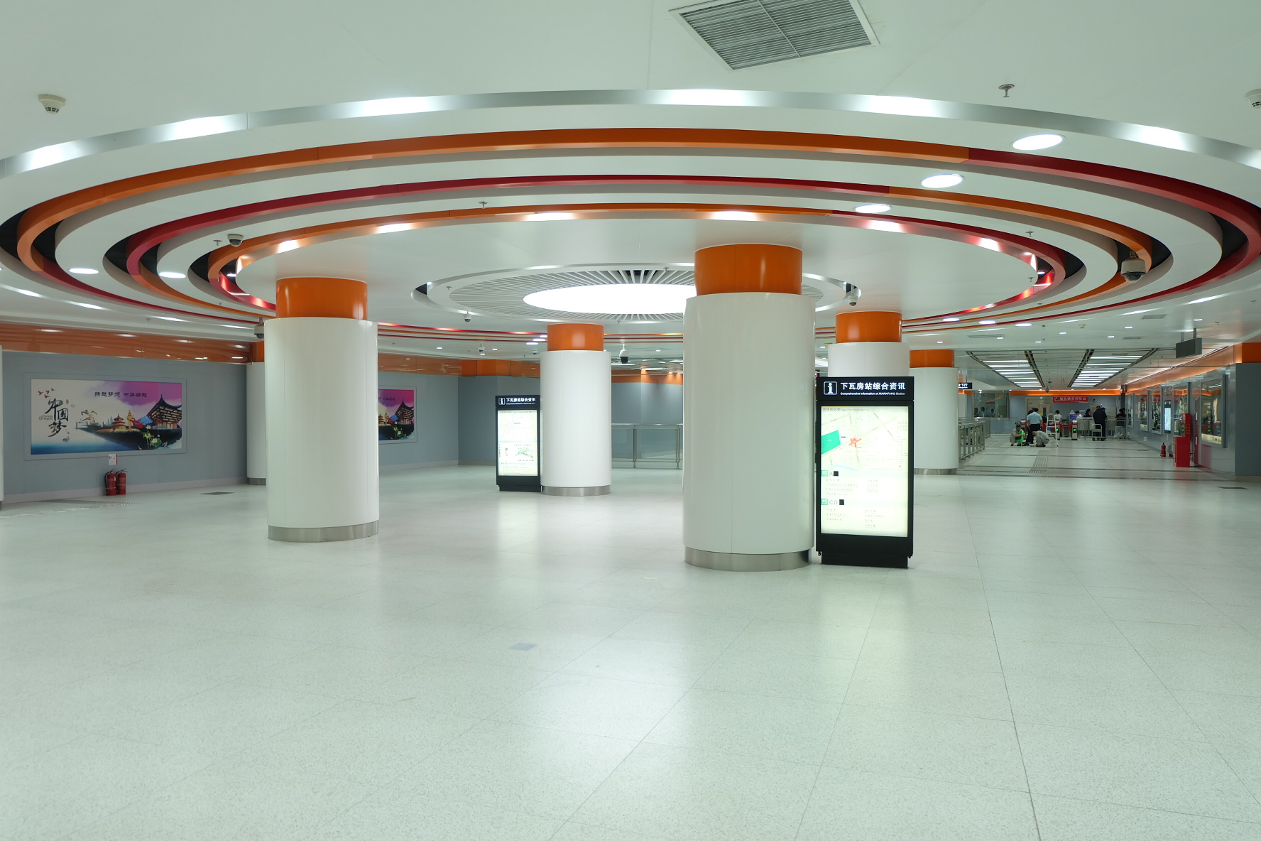 天津地铁下瓦房站改造后站厅